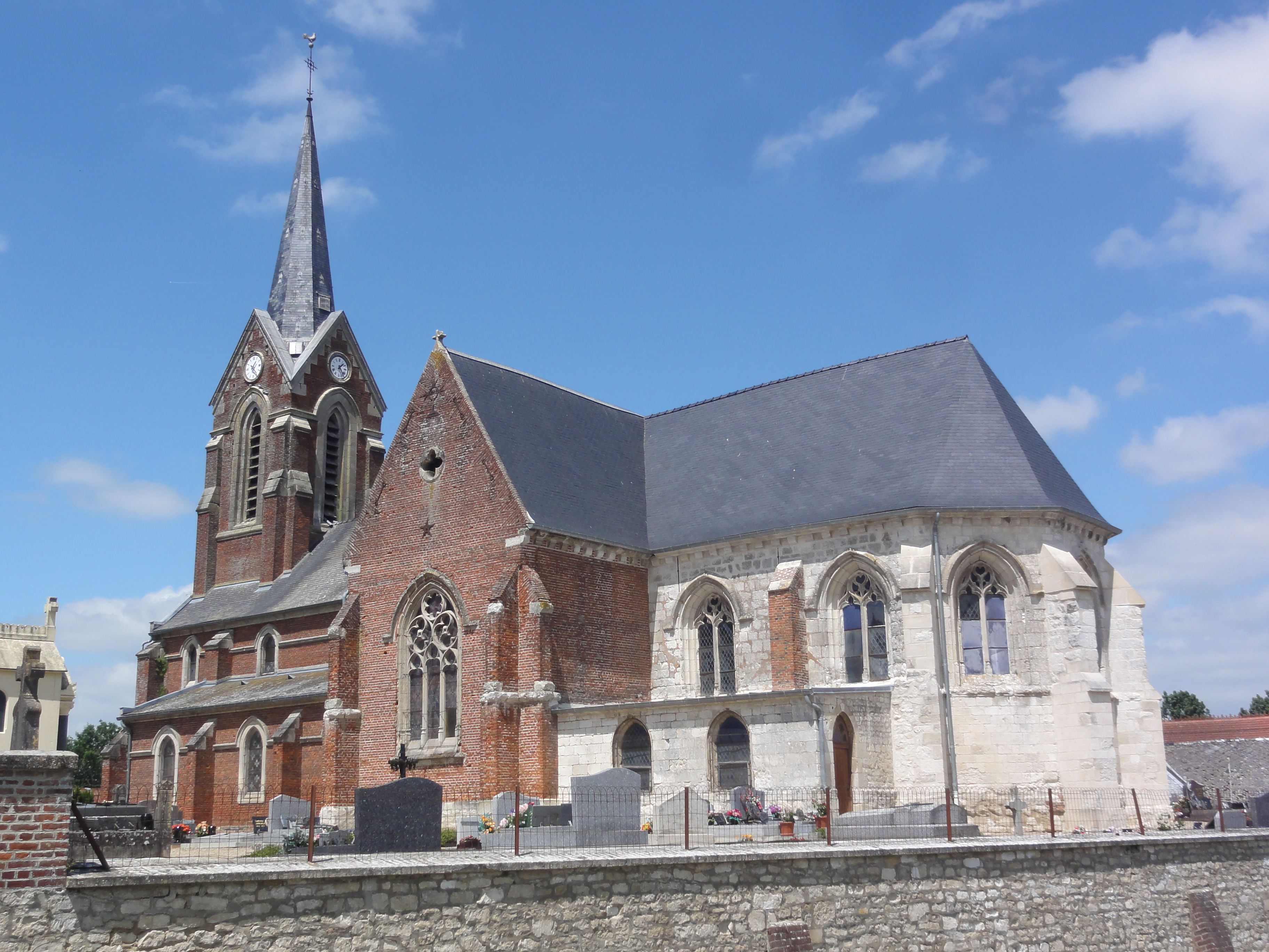 Montigny-le-Franc (Aisne) église